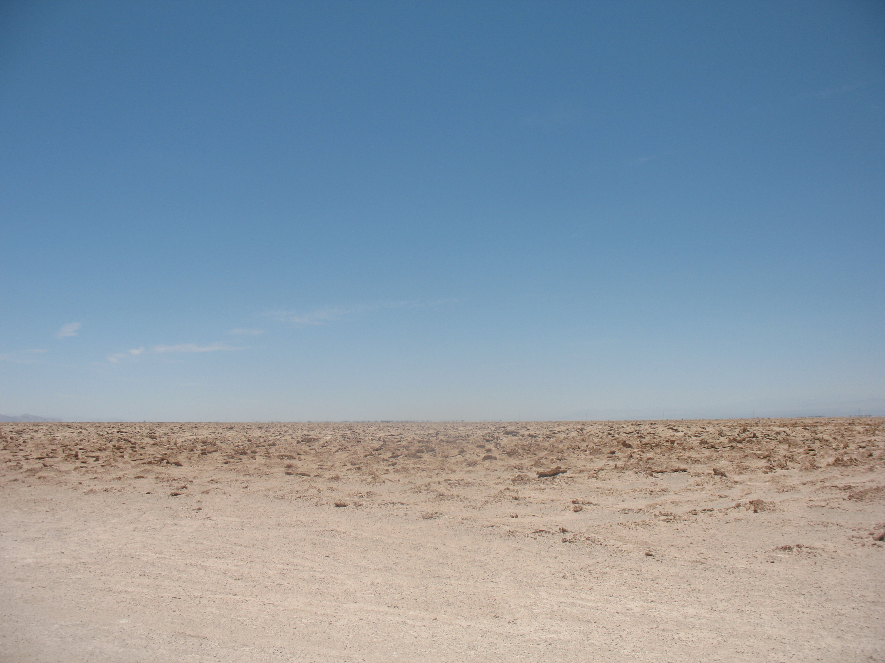 Reserva nacional Pampa del Tamarugal